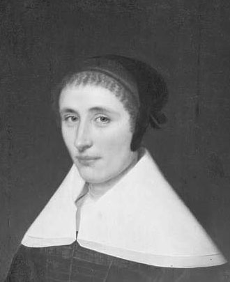 Maria Gerritsdr. Vermeij († 1645)